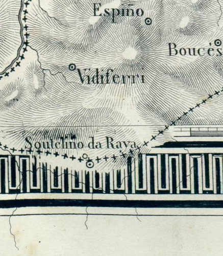 Soutelinho na Carta xeométrica de Galiza.